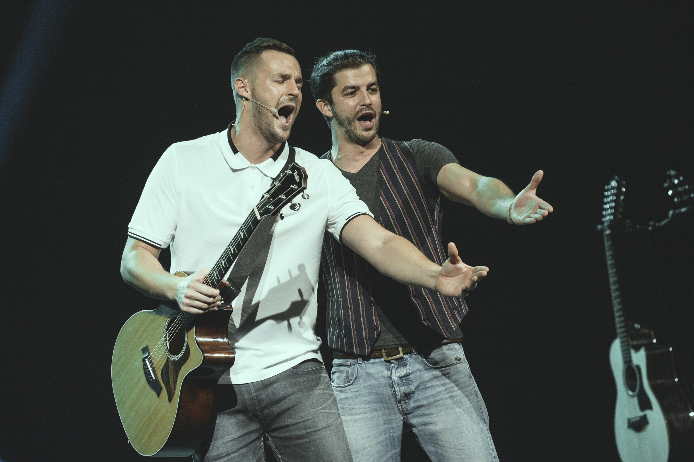 Pizzera Jaus Foto: Ulrike Rauch